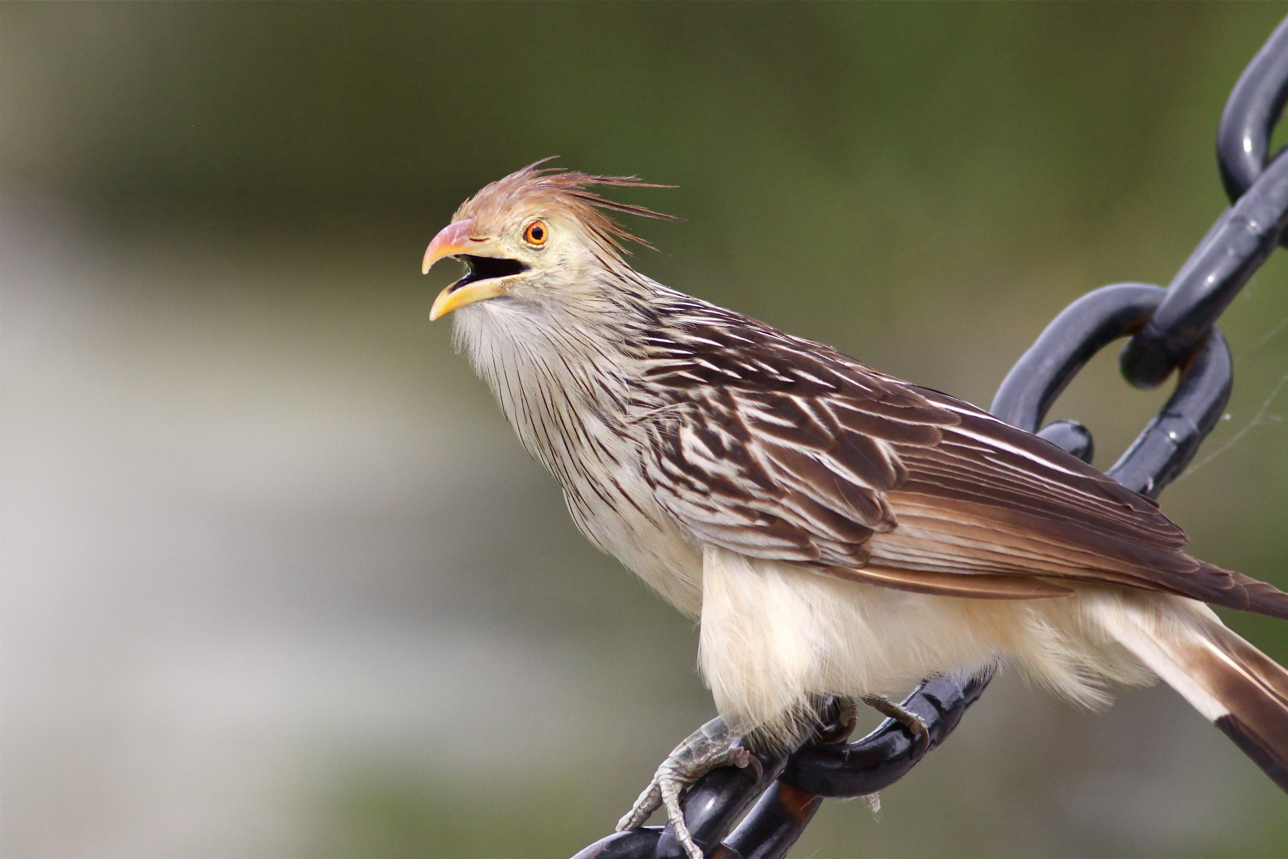 Costanera Sur Nature Reserve, Buenos Aires, Argentina